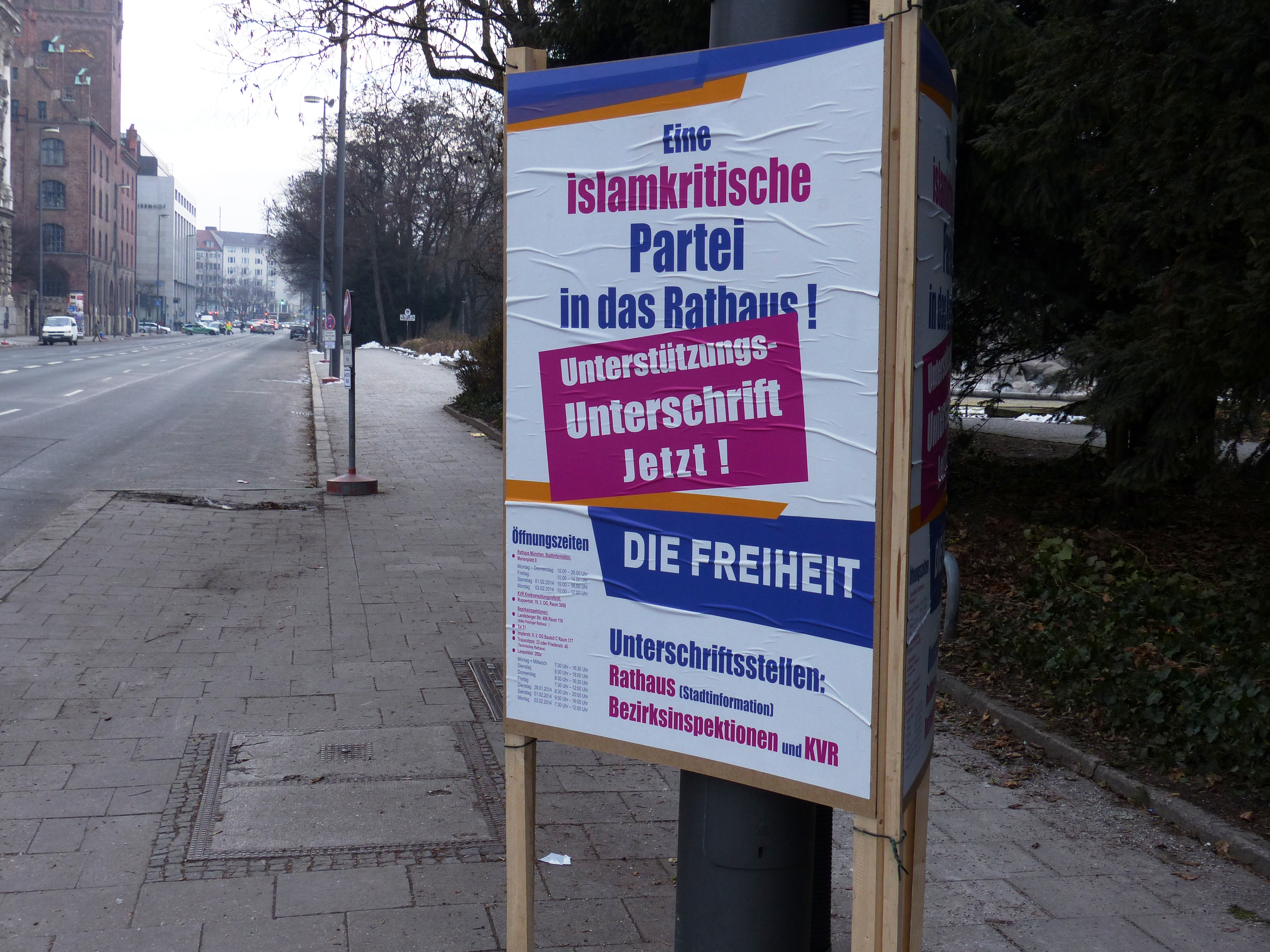 Partei Die Freiheit Plakat Kommunalwahl 2014